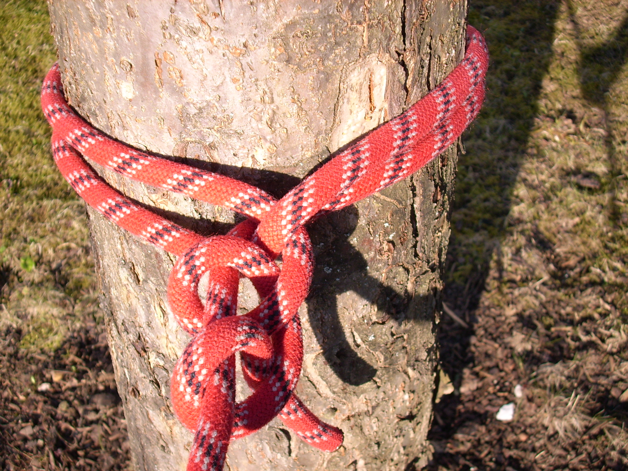 Webeleinenstek, Ende gesichert mit zwei halben Schlägen